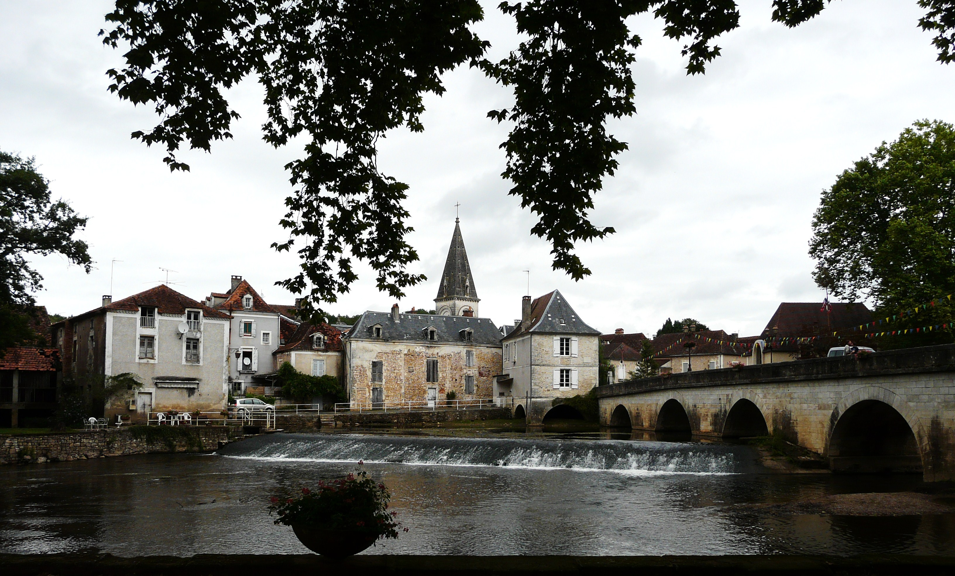 L'Auvézère à Cubjac